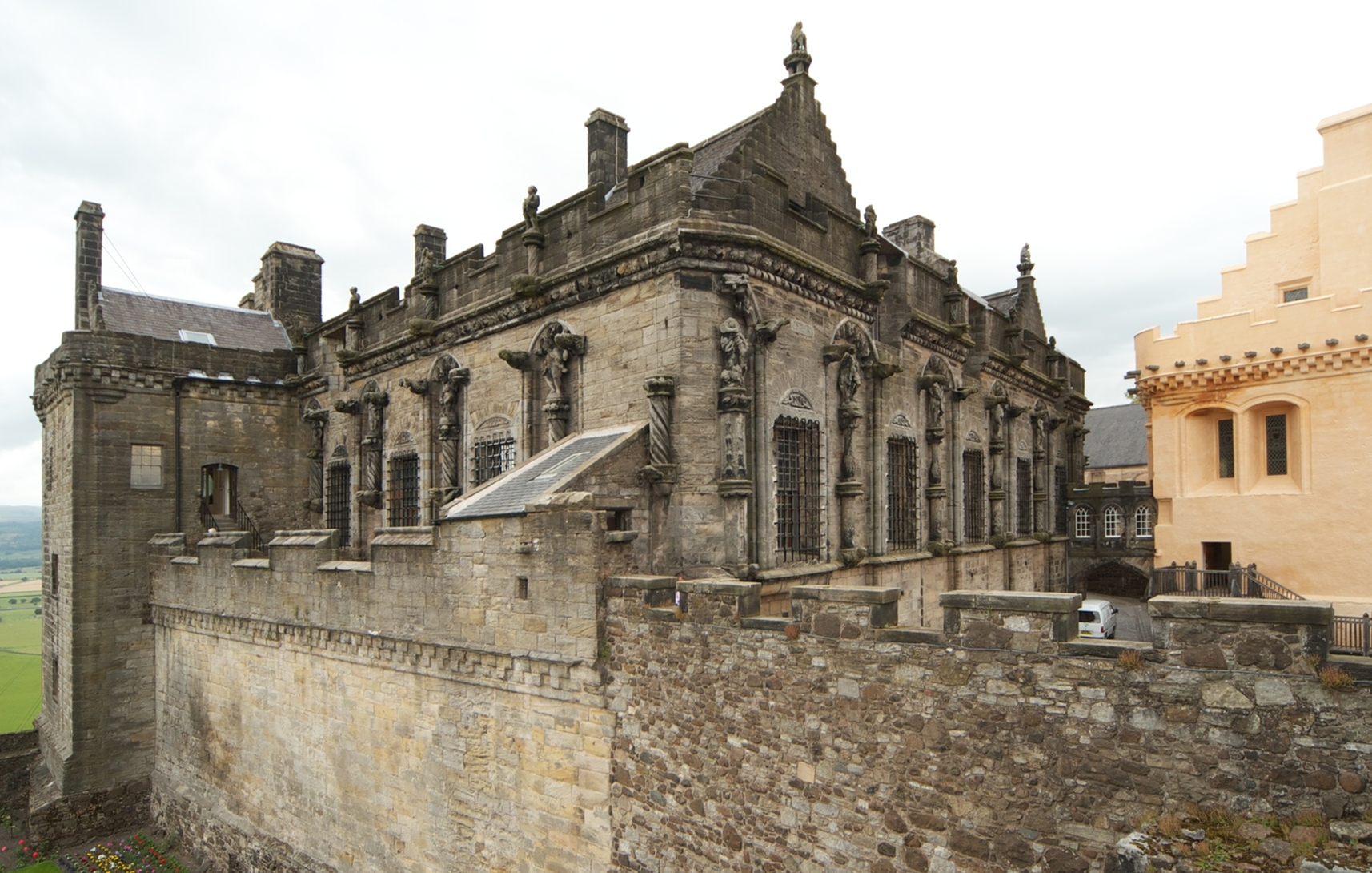 Royal Palace